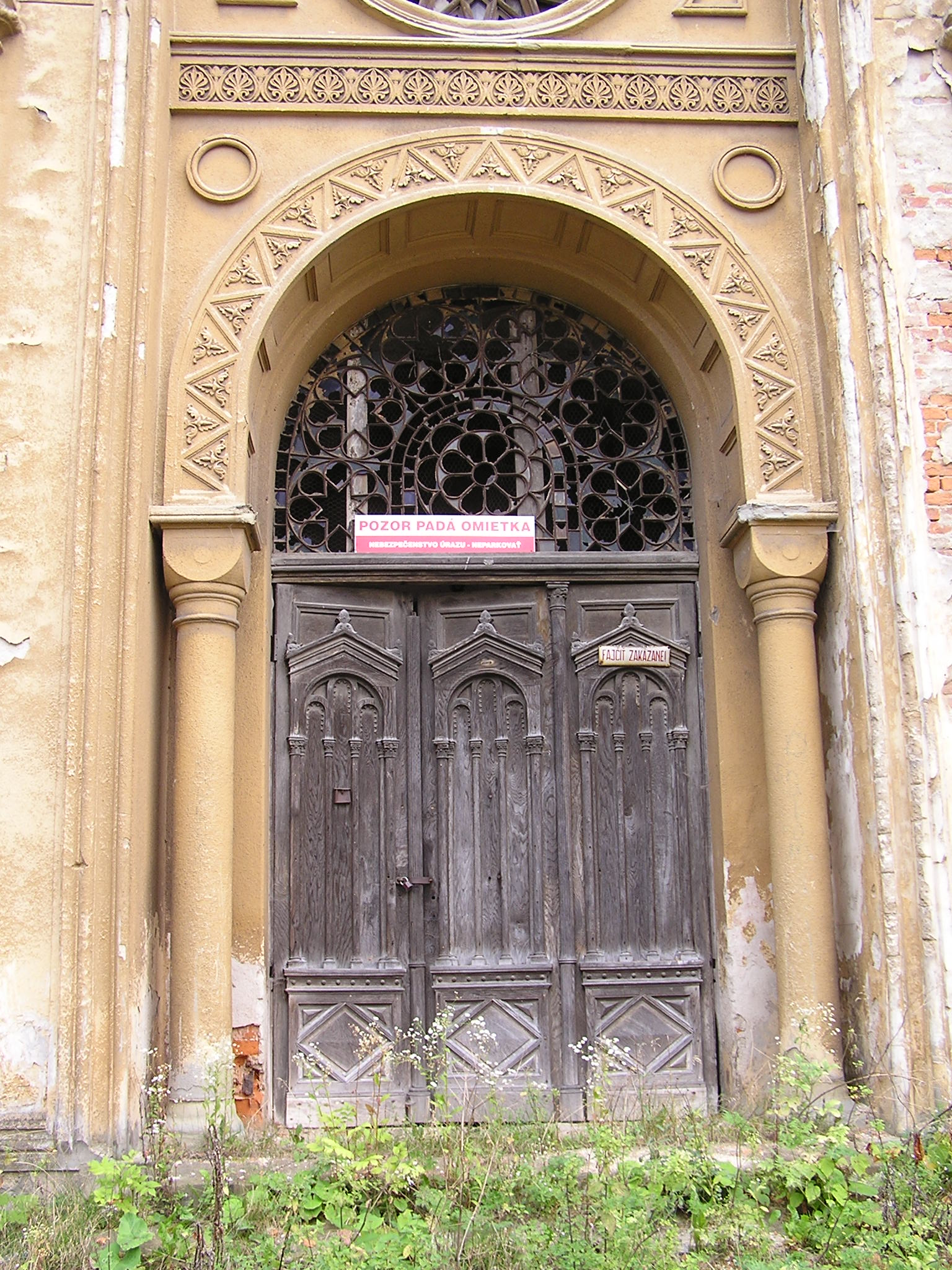 Synagóga v Bytči, detail fasády.